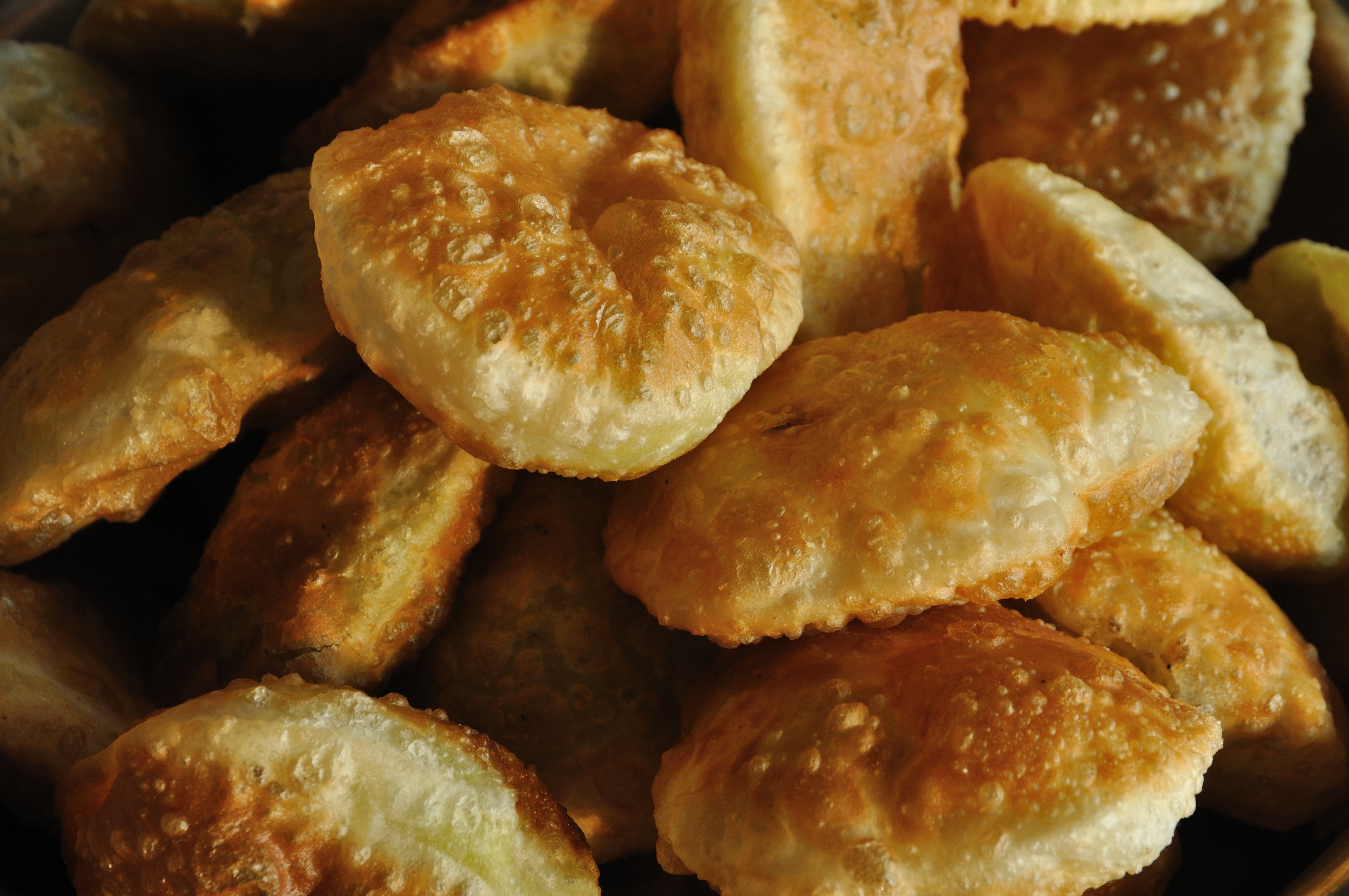 Photographed at Kolkata.